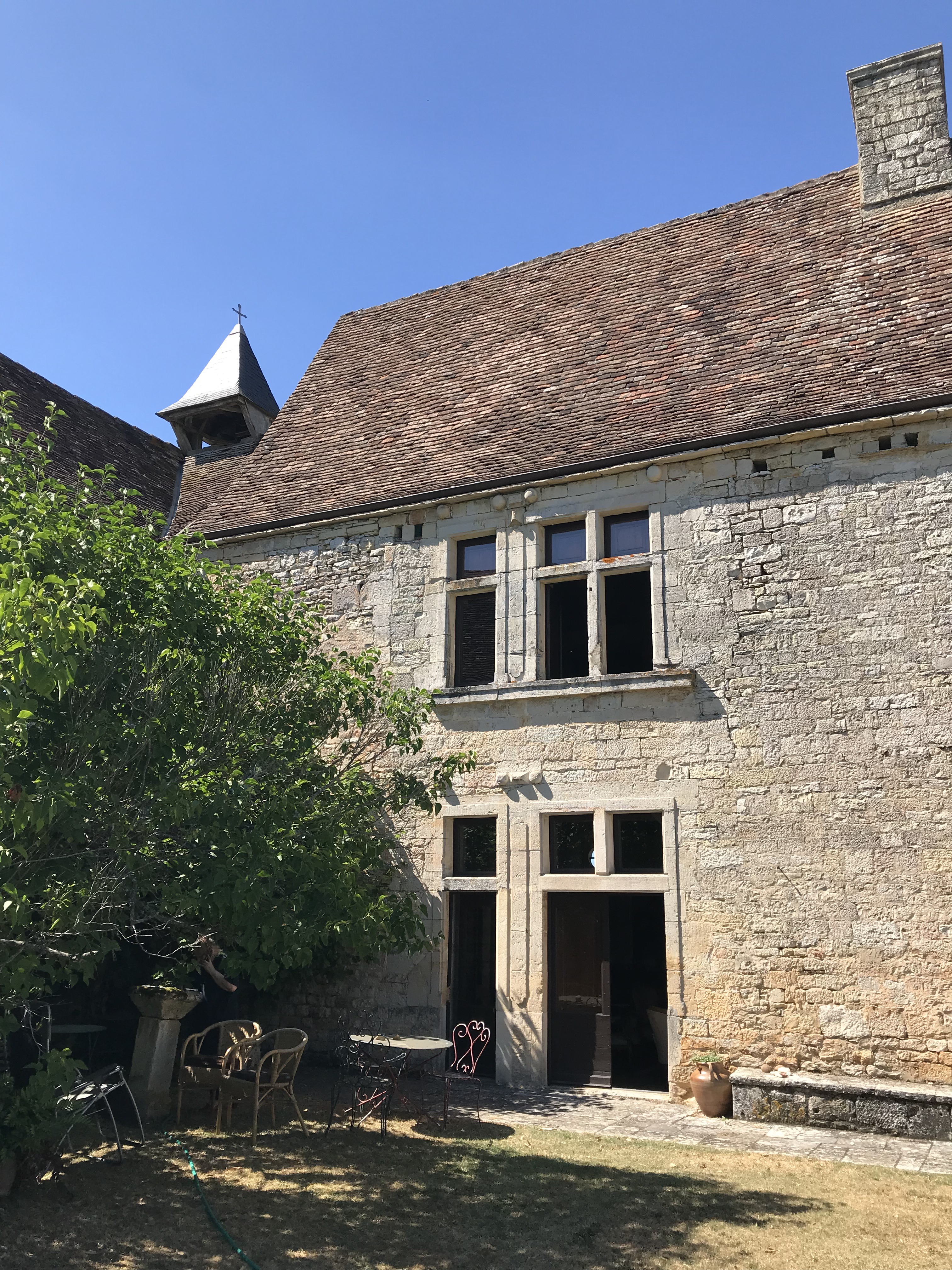 façade sud 17ème siècle